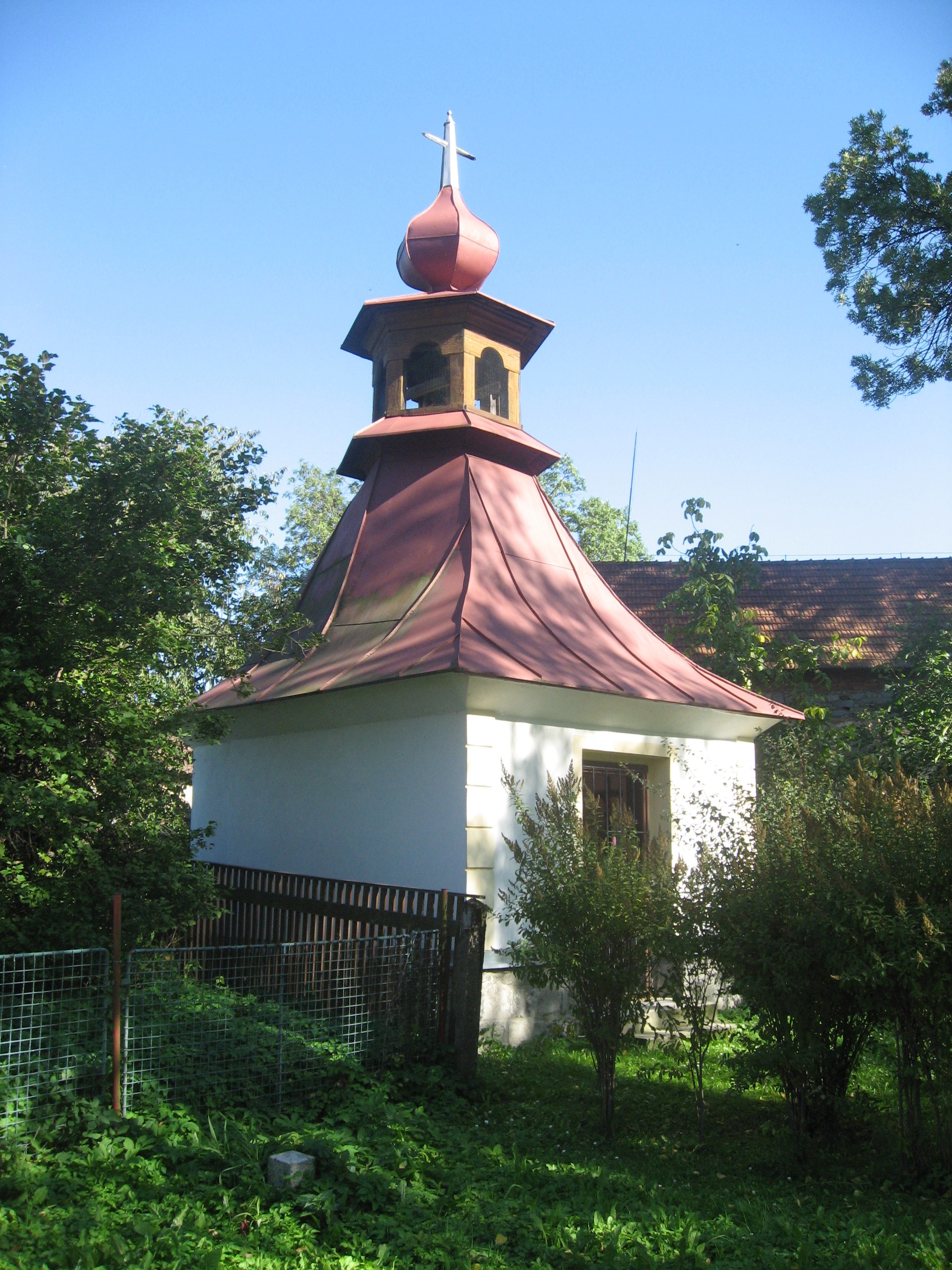 Zdislavice, kaplička